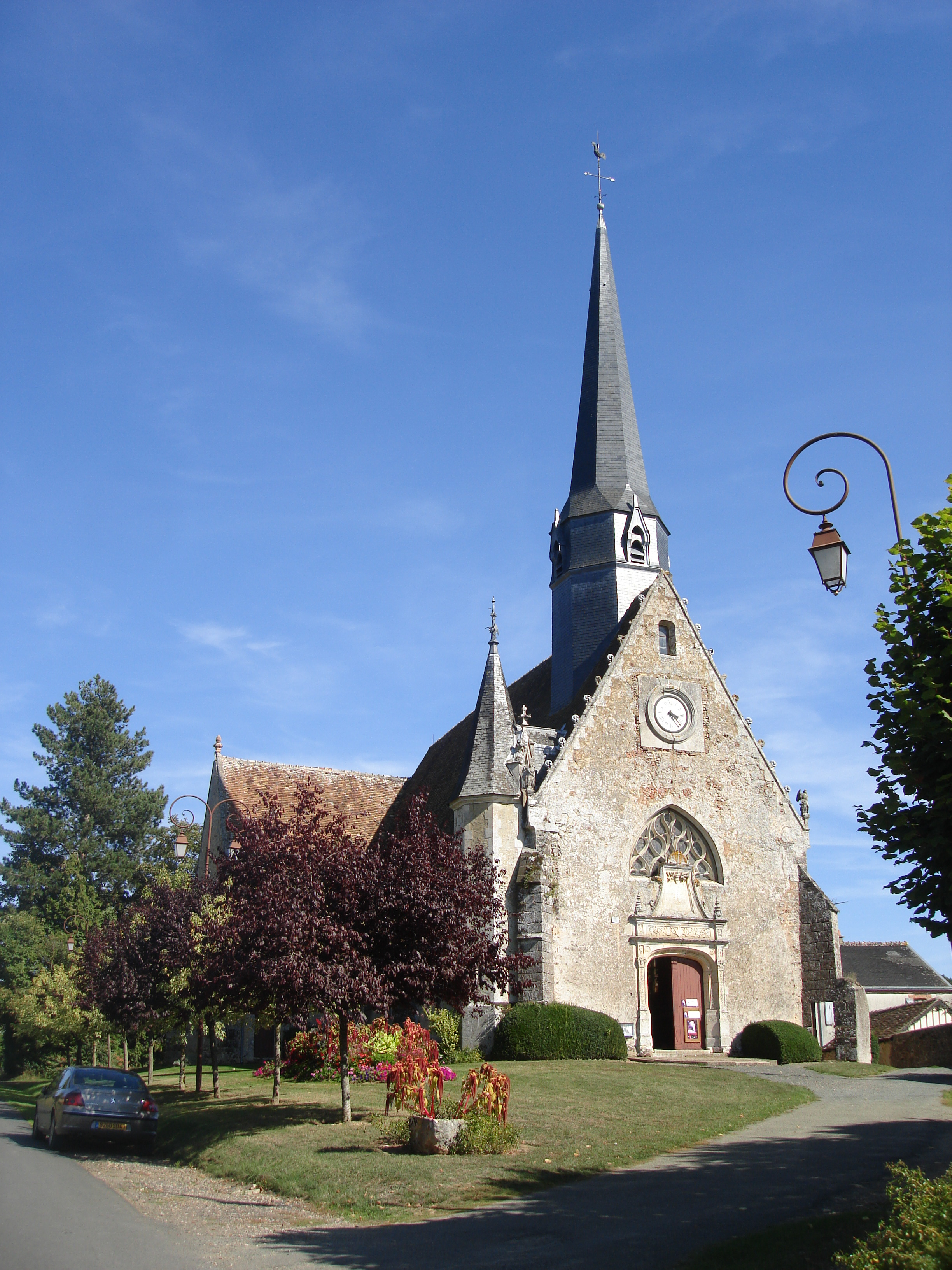 Pregxejo de Baillou